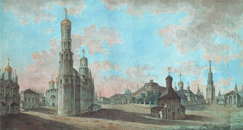 Ф.Я. Алексеев. Панорама Ивановской площади. Графика конца ХVIII — начала ХIХ века